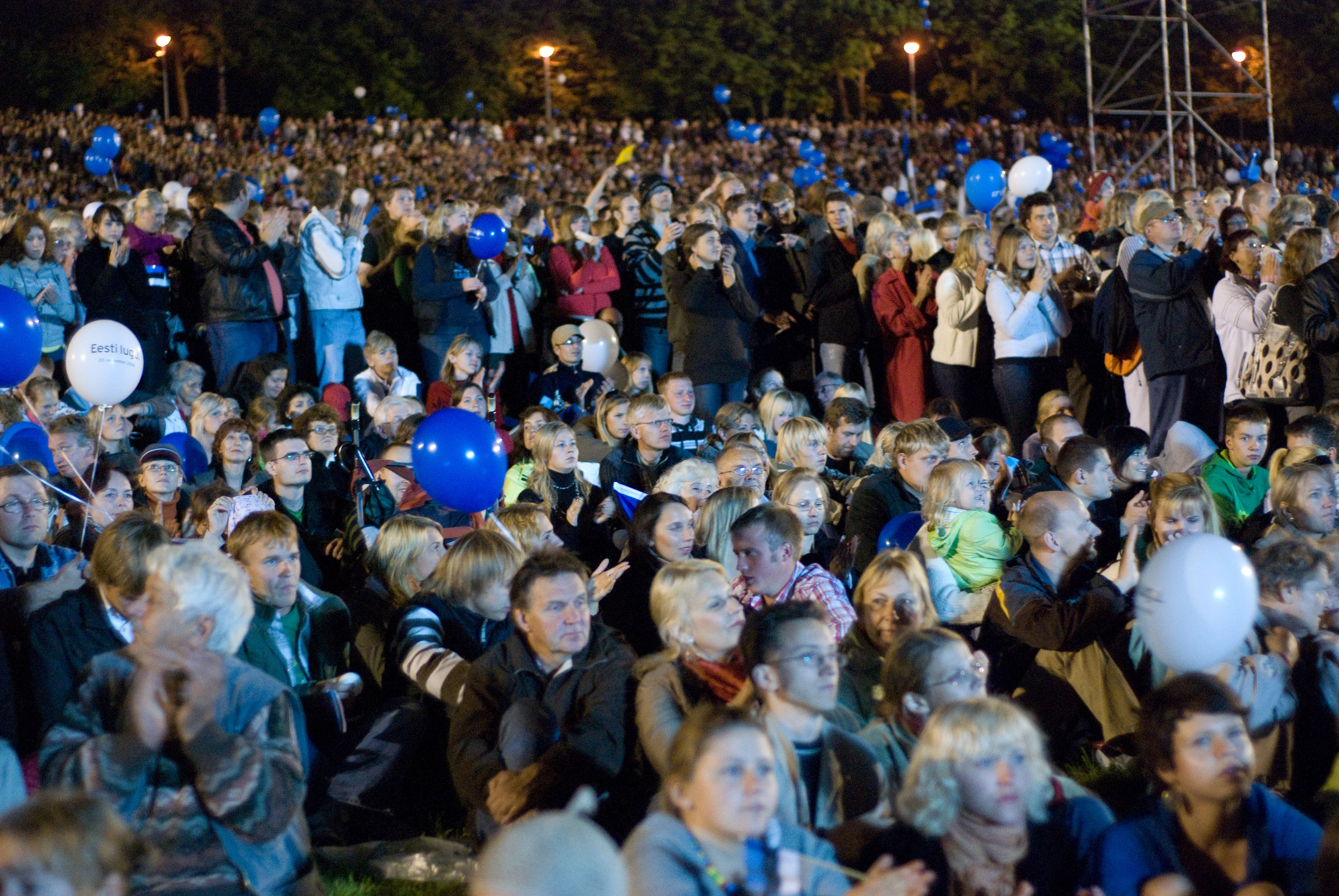 Estonian night song festival "Märkamisaeg" (Time to Notice) on 19 August 2008.